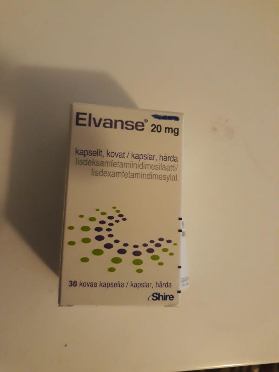 Elvanse 20mg capsules, Finnish market labeling. Lisdexamphetamine. Elvanse 20mg kapselit, suomenkieliset pakkaustekstit. Lisdeksamfetamiini.